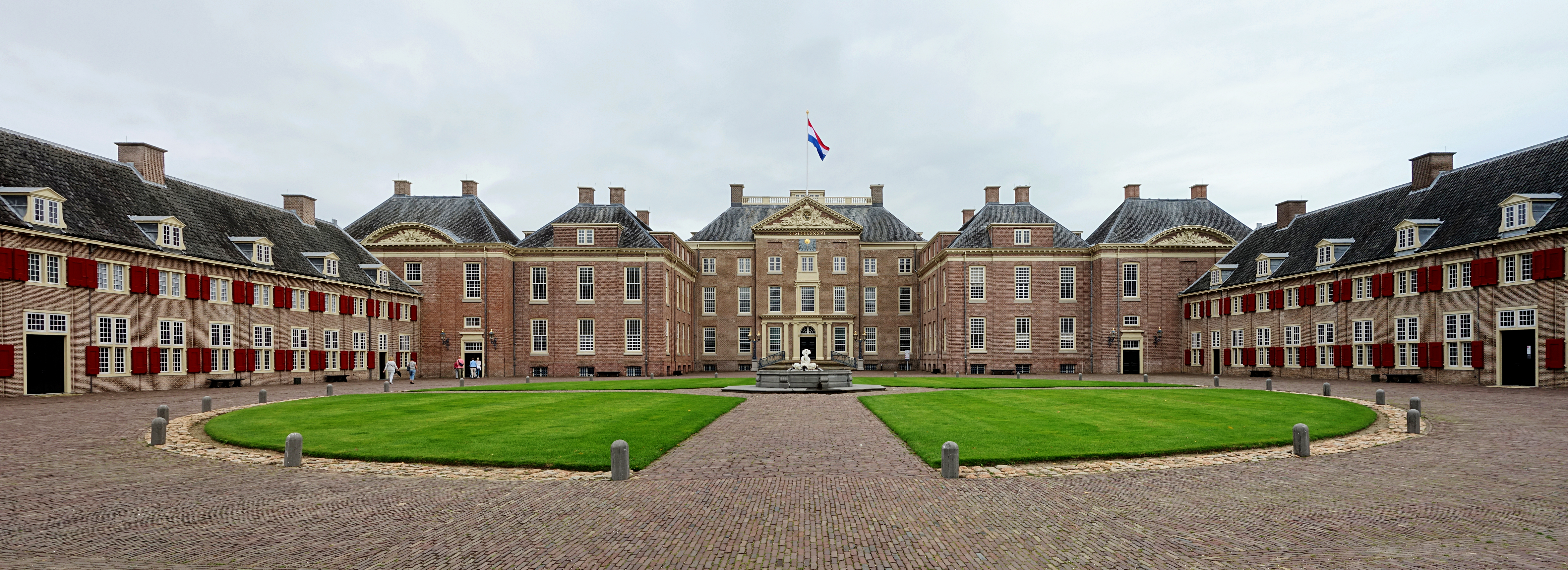 Entrée du palais Het Loo.